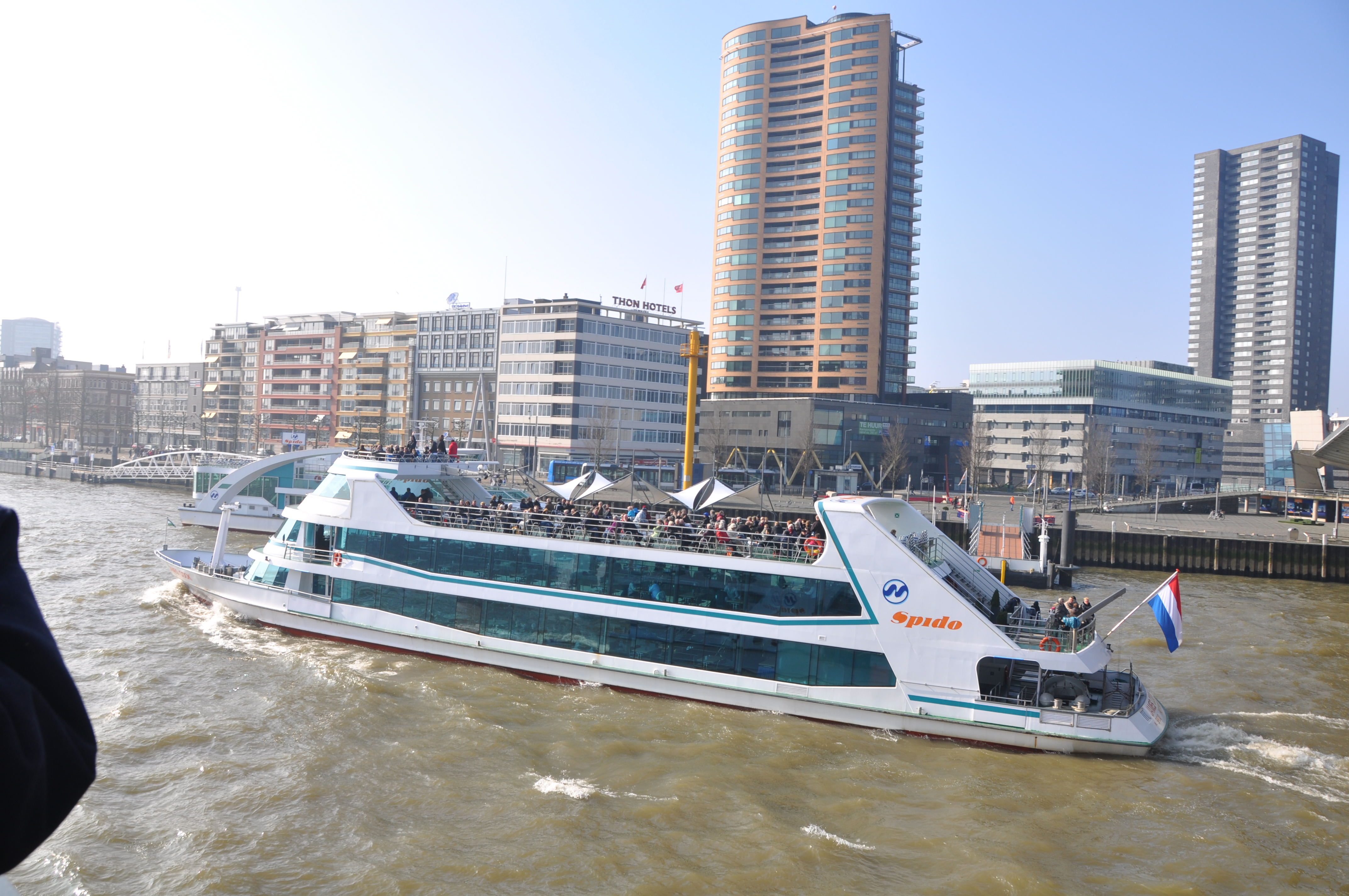 De JAMES COOK met de leden van de LVBHB aan het varen in Rotterdam.